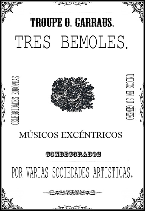 Restauración digital de un cartel anunciador del grupo "Tres Bemoles" (Troupe O. Garraus)